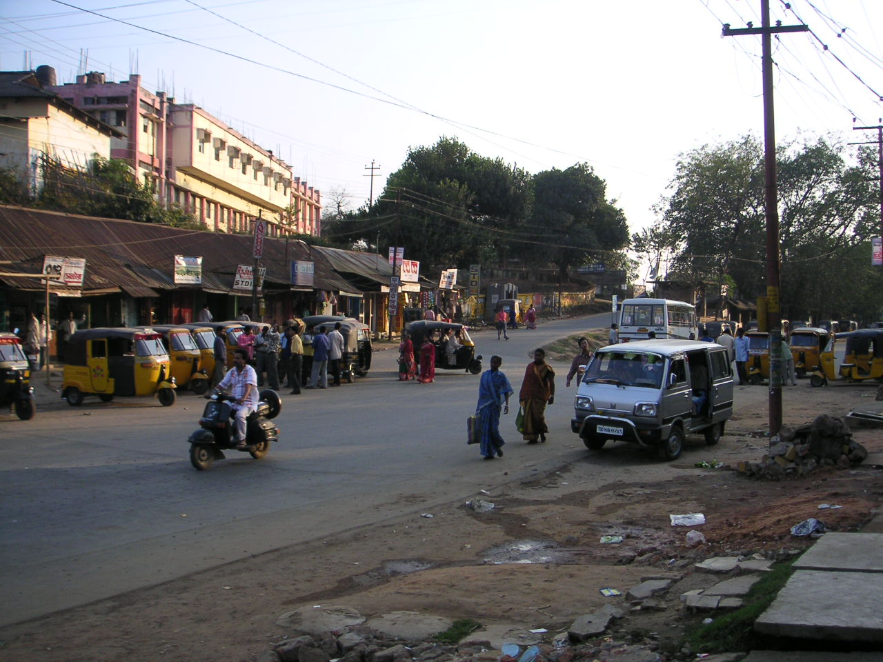 Agartala, Tripura.